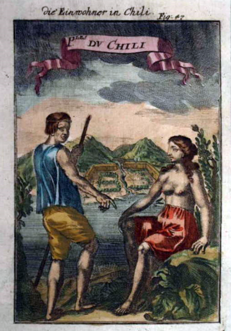 View of Chileans, 1685 by Alain Manesson Mallet, Paris, 1683